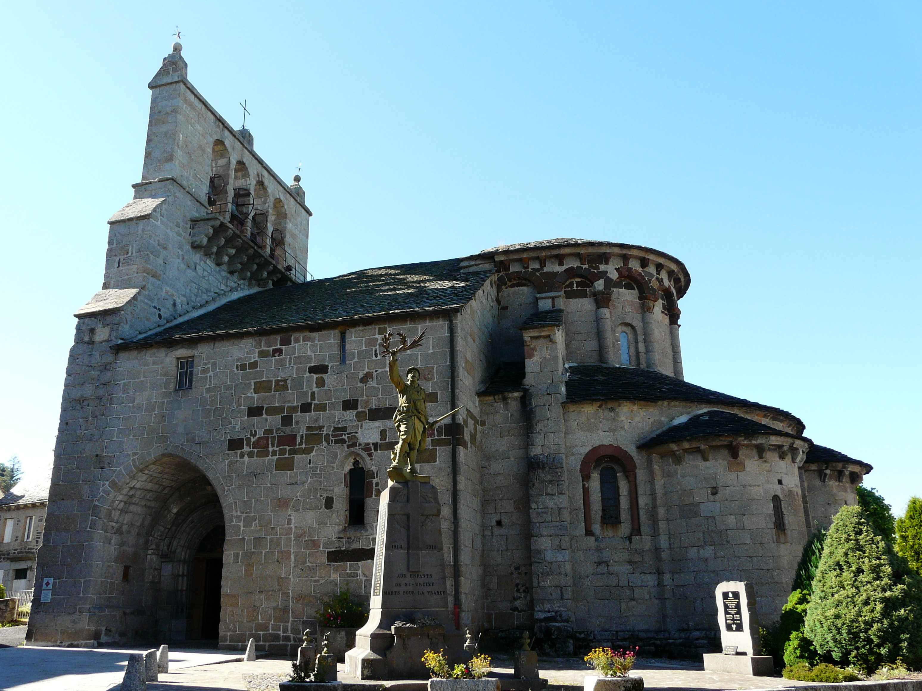 L'église de Saint-Urcize, Cantal, France.